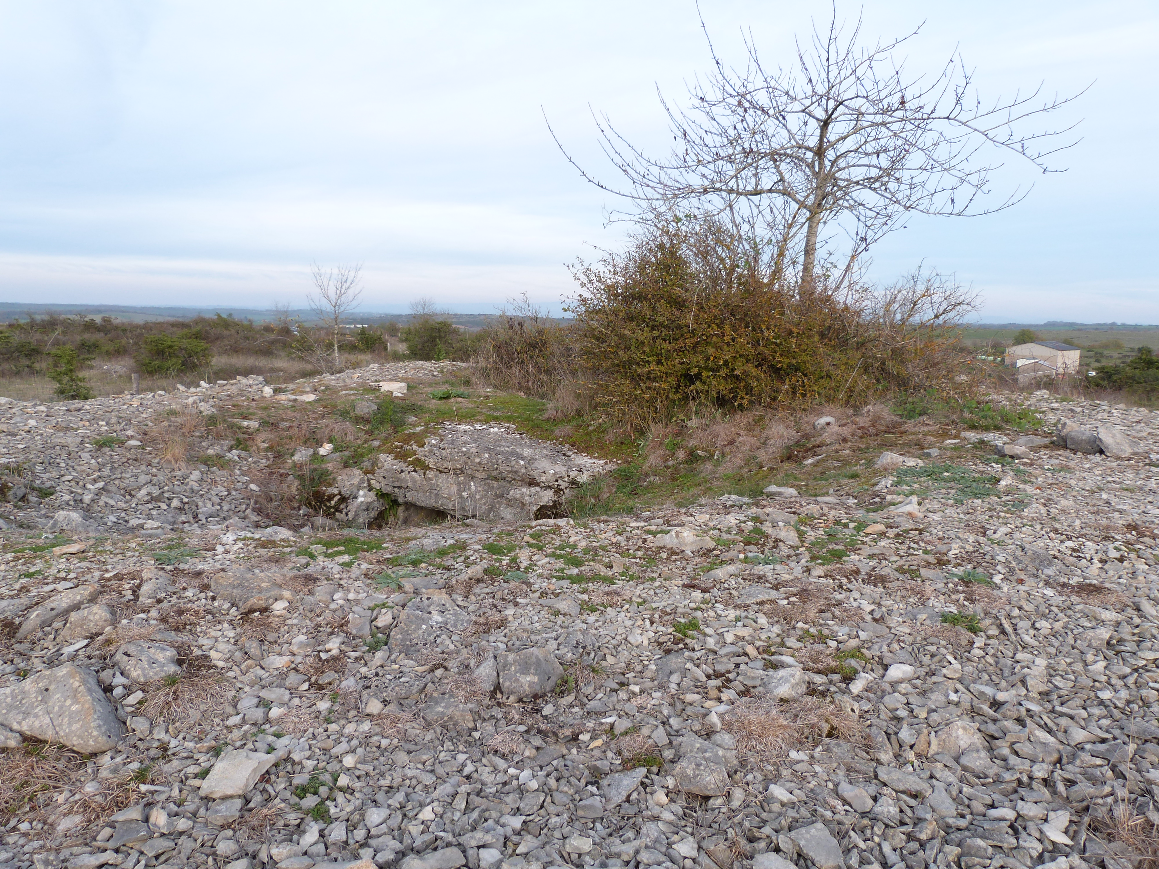 Dolmen du Genevrier (vue partielle de l'entrée et tumulus)